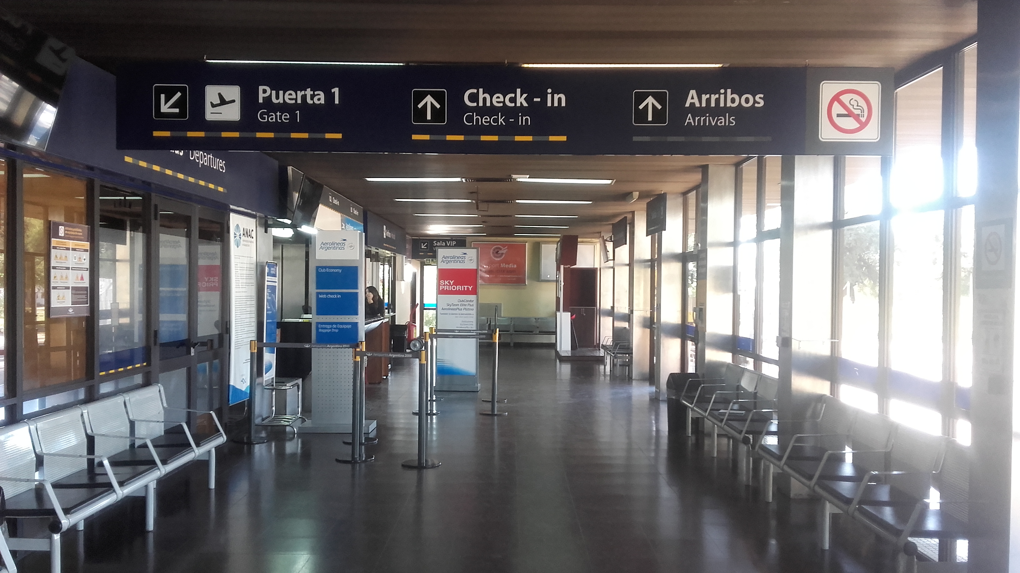 Salón principal Aeropuerto Capitán Vicente Almandos Almonacid